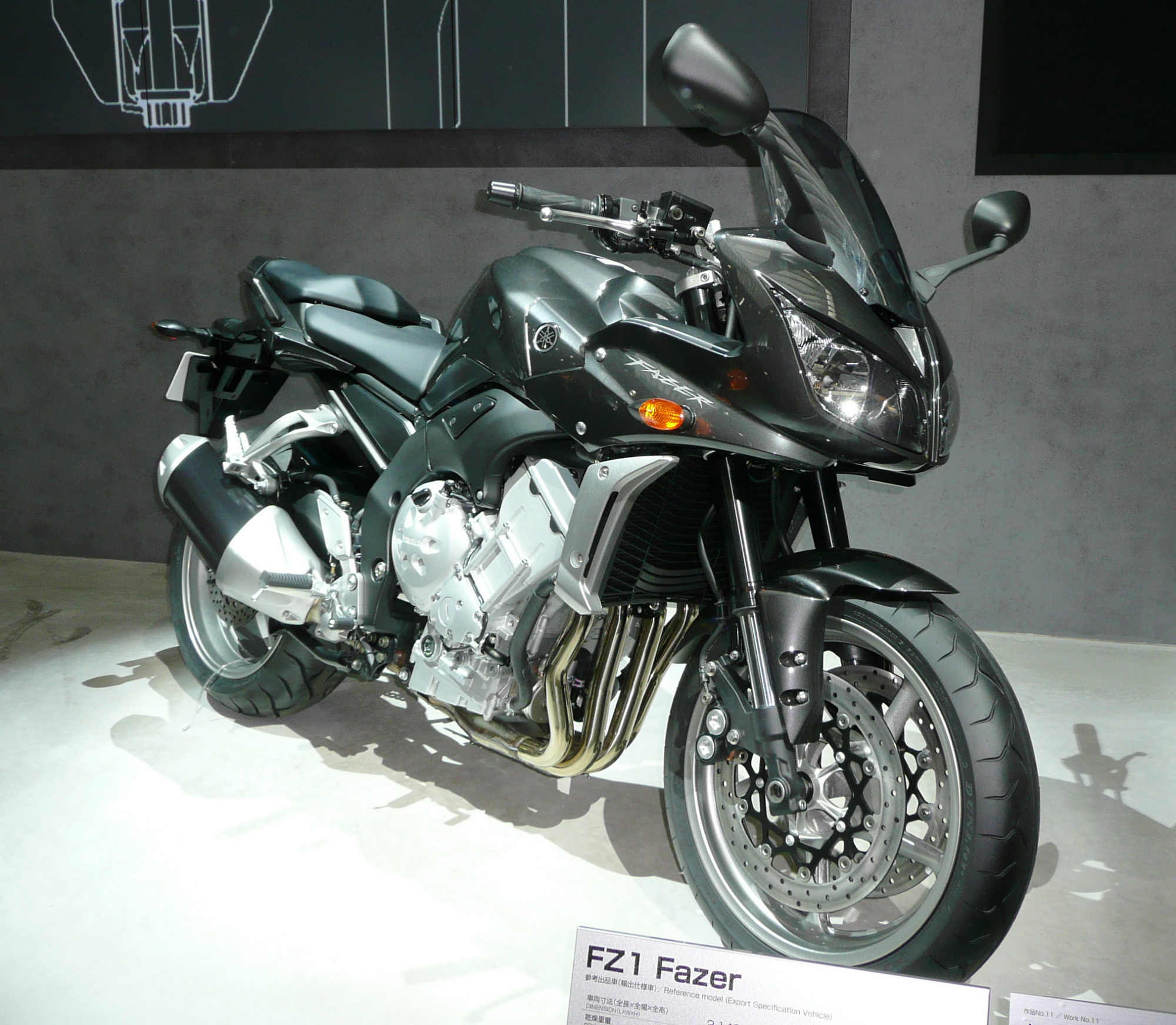 Yamaha FZ1 Fazer(2007 Tokyo Motor Show)